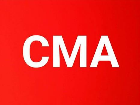 Drapeau de la Coordination des mouvements de l'Azawad (CMA)